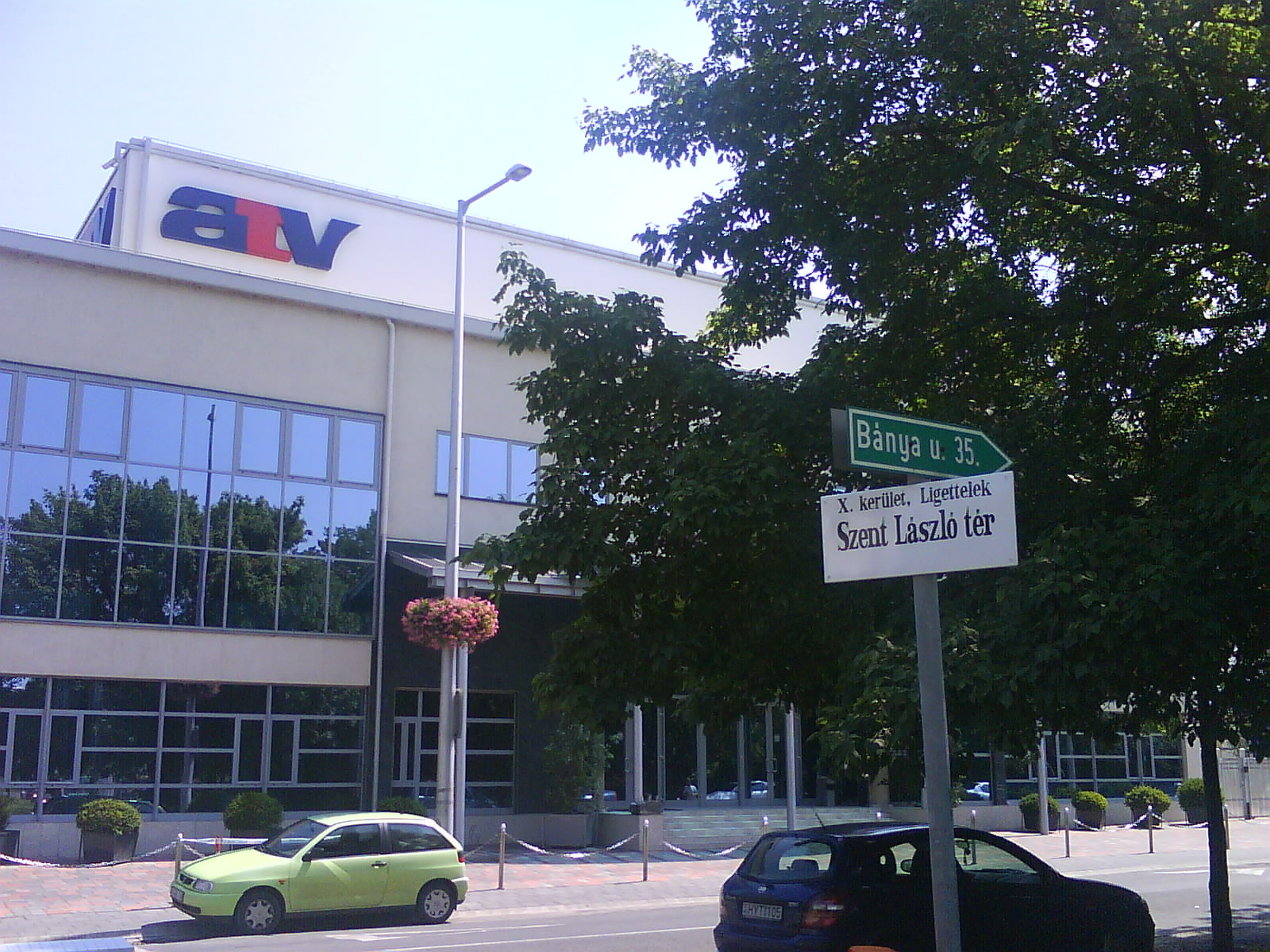 Az ATV-székház a Szent László téren (Budapest, X. Kőrösi Csoma Sándor u. 31)